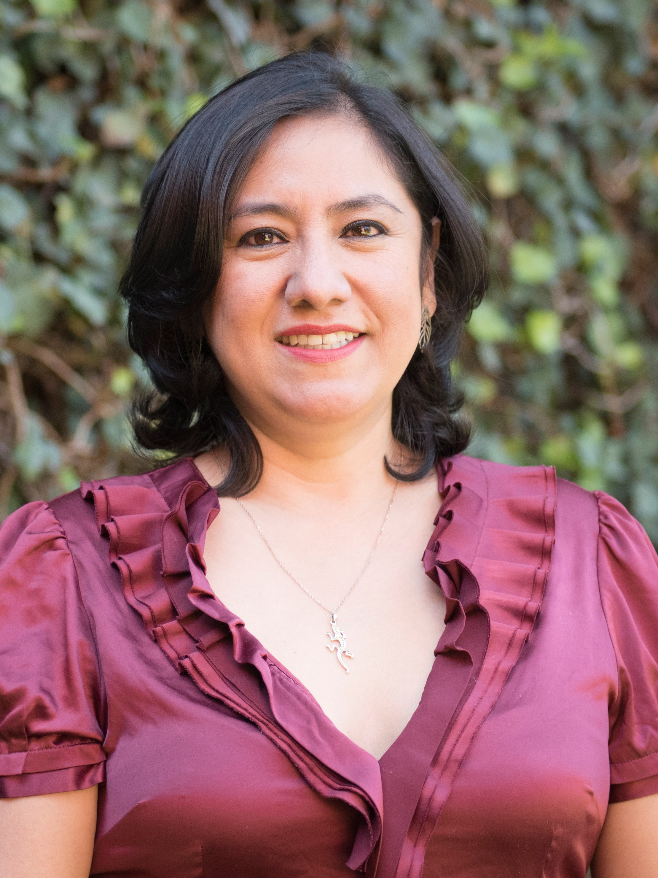 La politóloga y académica posa para una sesión de fotos en 2016.